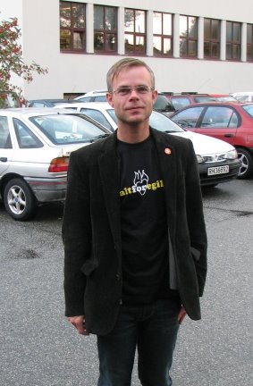 Tore Renberg (fotograf: Leif Harboe)